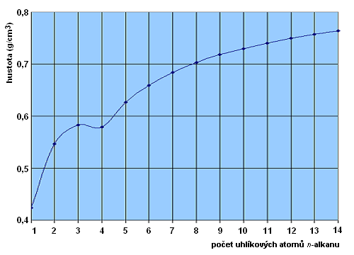 Hustota n-alkanů v závislosti na počtu uhlíků Autor: Antonín Vítek, e-mail: avitek(at)lib(dot)cas(dot)cz